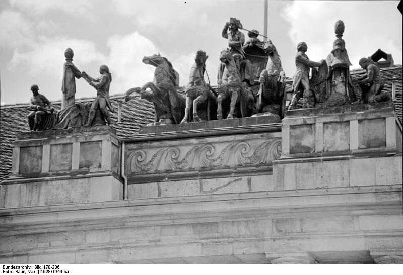 Potsdam.- Gruppe am Kutschstall